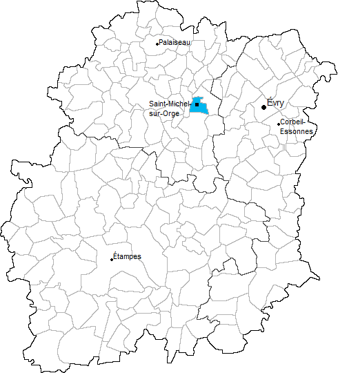 Carte du canton de Saint-Michel-sur-Orge en Essonne (91)